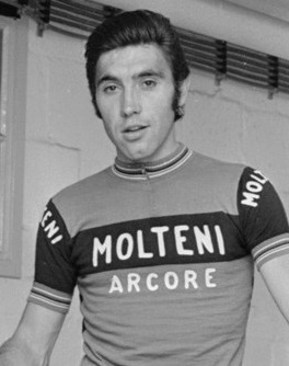 自転車競技選手のエディ・メルクス。1973年8月2日撮影